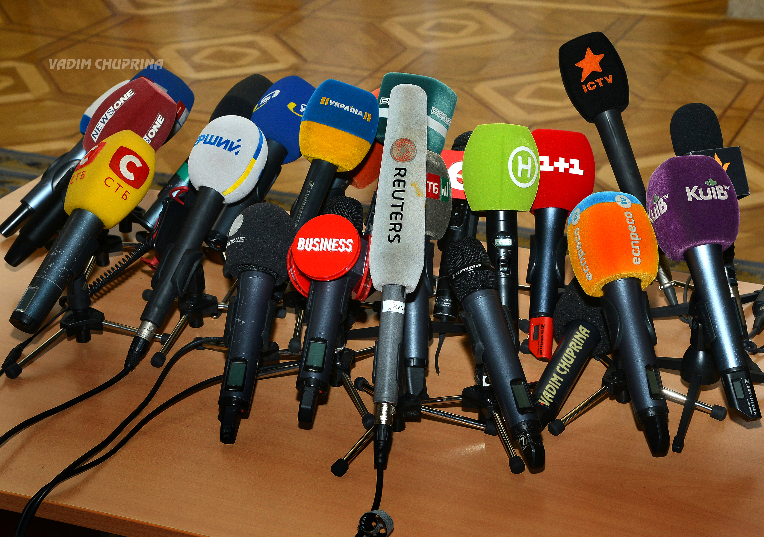 УКРАИНА, фото Чуприна Вадим,PRESS